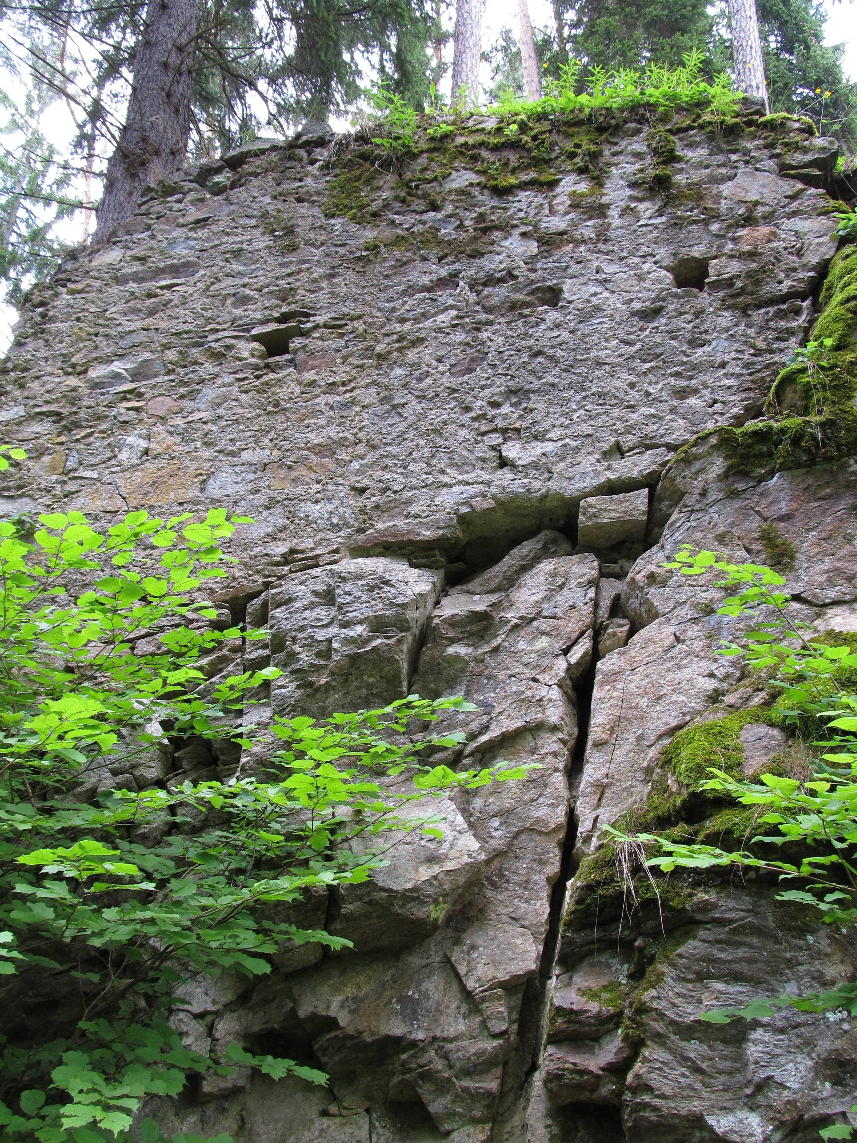 Hrad Hus, zřícenina, Z od vsi, Křišťanovice